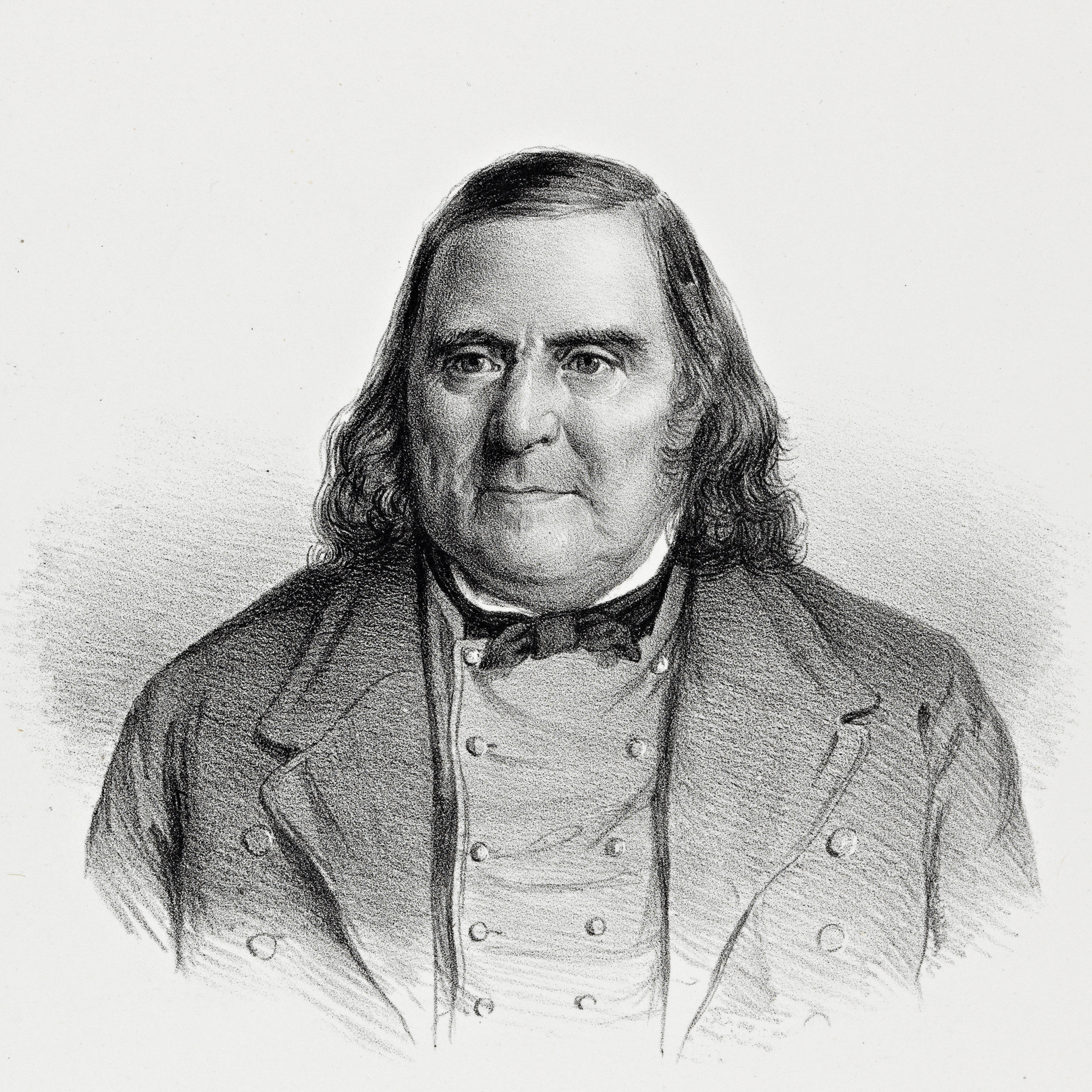 Tittel / Title: Portrett av Teis Lundegaard (1774-1856) Beskrivelse / Description: Litografi. Møtte på Riksforsamlingen som bonderepresentant for Lister amt, tilhørte selvstendighetspartiet. Dato / Date: ukjent / unknown Kreditering / Credit: K. Bergalien del., Em. Bærentzen & Co lith. Inst., Dybwad forlag (Christiania) Eier / Owner Institution: Nasjonalbiblioteket / National Library of Norway Lenke / Link: Bildesignatur / Image Number: blds_05620